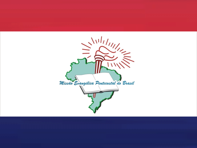 Logomarca da Missao Evangelica Pentecostal do Brasil.